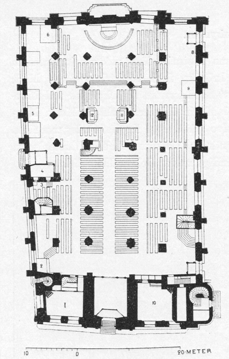 Planritning över Storkyrkan i Stockholm